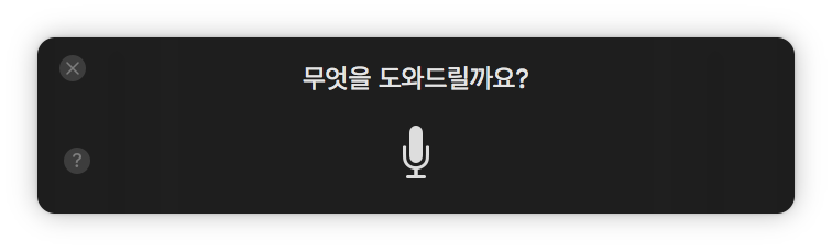 macOS 시에라의 시리 한글판...